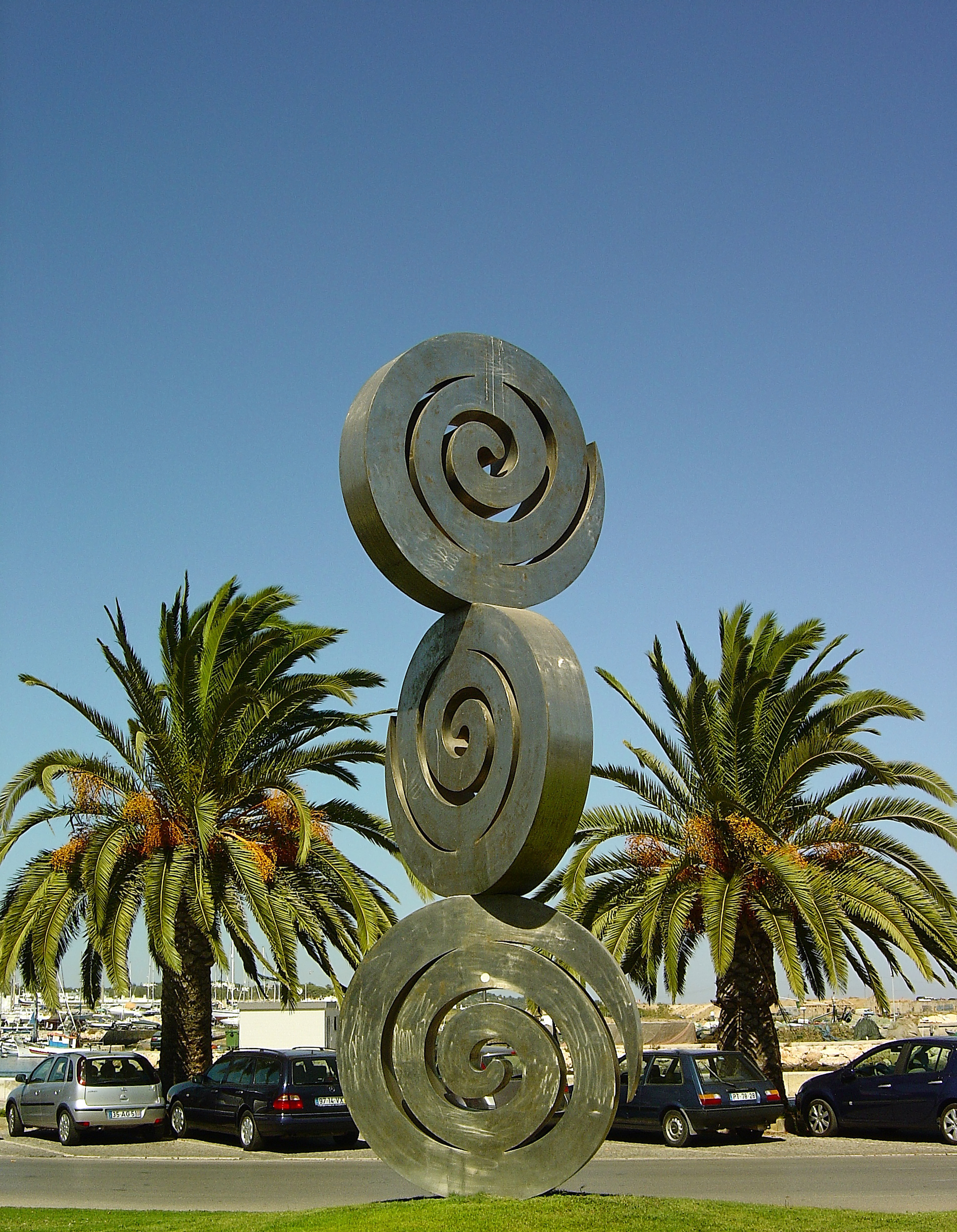 Da autoria de Xana. Av. dos Descobrimentos, Lagos, inaugurado em junho de 1997 aço inoxidável, 600 x 200 x 200 cm (executado por J.O.M.A.L.) inscrição na placa junto ao monumento: ESTEVÃO AFONSO . PEDRO ALEMÃO . RODRIGO ALVARES . JOÃO DIAS . VICENTE DIAS . AFONSO EANES . FERNANDO EANES . GIL EANES . RODRIGO EANES . LOURENÇO DE ELVAS . JOÃO FERNANDES ALVARO DE FREITAS . LANÇAROTE DE FREITAS . GIL LEONEL . DIOGO GONÇALVES . GIL GONÇALVES . GOMES PIRES . RUI LOURENÇO REIXA MARTIM VICENTE . FERNÃO VILARINHO . JOÃO VILES . GOMES VINAGRE ... E OUTROS. NAVEGADORES QUE IMPULSIONADOS PELO INFANTE D. HENRIQUE INICIARAM NO SEC. XV AS VIAGENS DE DESCOBRIMENTOS, EM PEQUENAS CARAVELAS COM AS QUAIS SE AVENTURARAM NA IMENSIDÃO DO "MAR TENEBROSO". MAS COM A SUA CORAJEM E ESPIRITO EMPREENDEDOR, DERAM UM GRANDE CONTRIBUTO PARA AS TRÊS REVOLUÇÕES DA ÉPOCA: NA TÉCNICA NÁUTICA , NO SABER GEOGRÁFICO, NA EVOLUÇÃO CULTURAL. See where this picture was taken. [?]